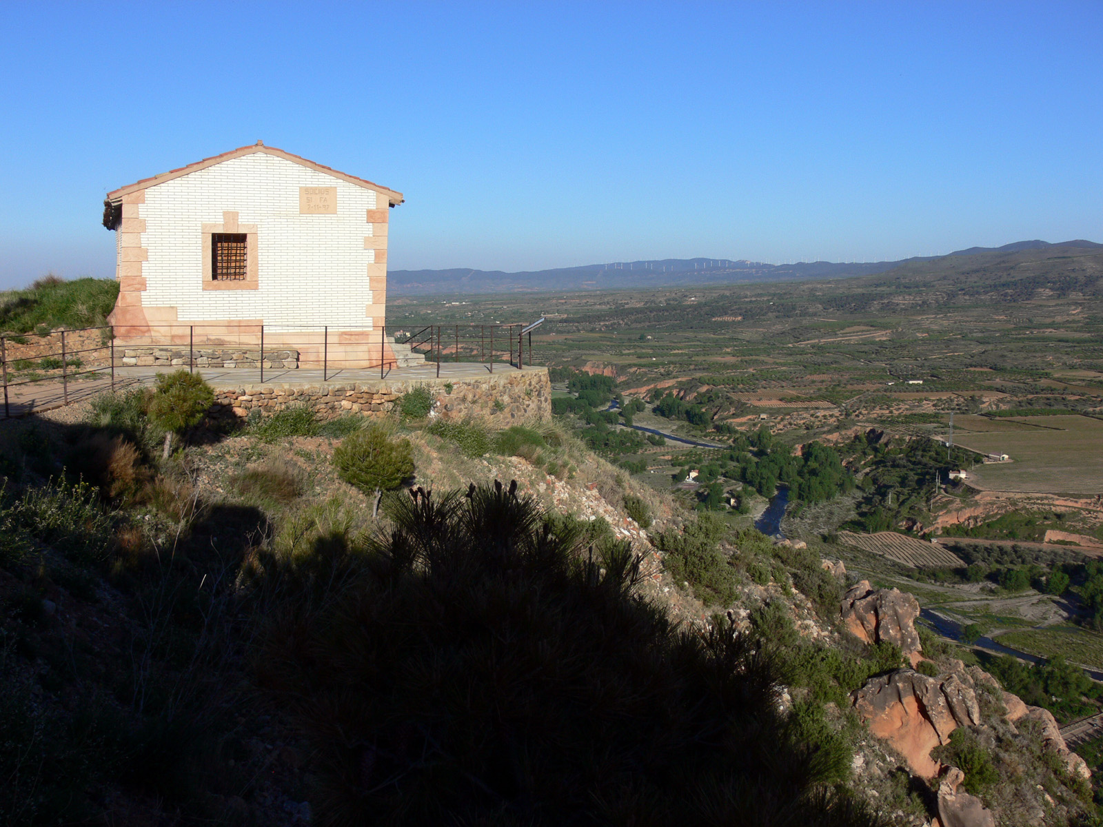 Ermita de San Salvador en Herce, La Rioja - España.